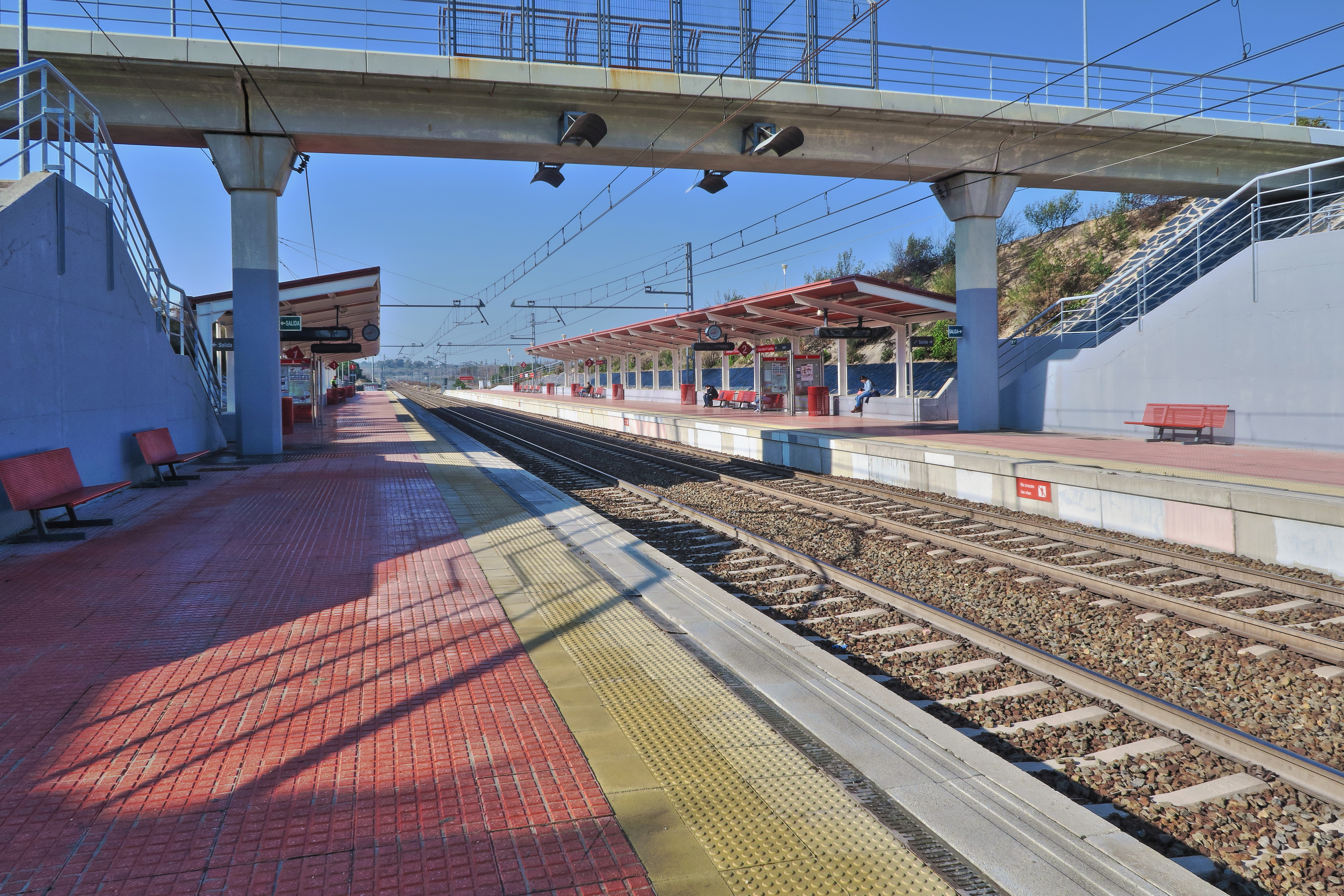 Estación de Universidad P. Comillas (Madrid).